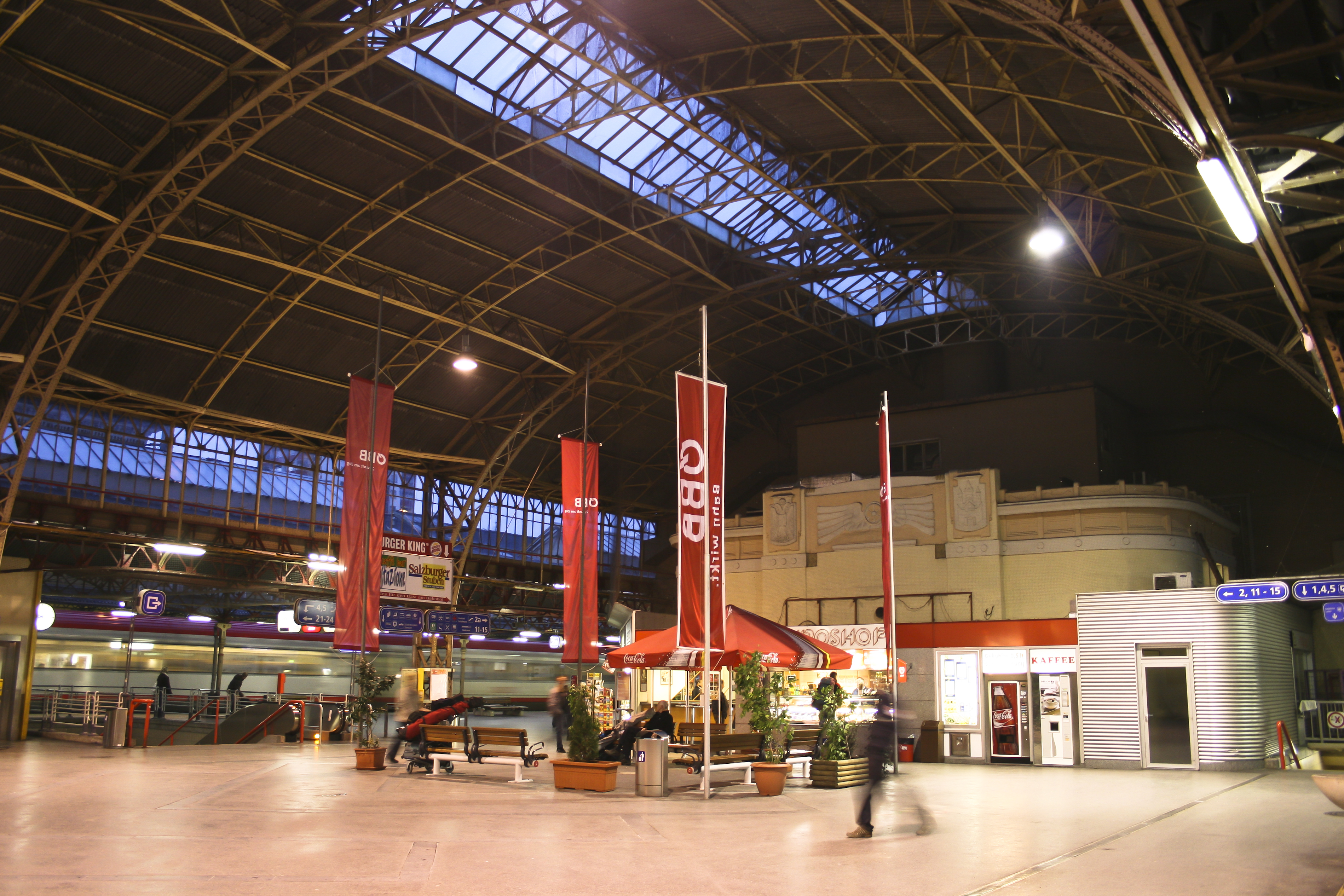 Hauptbahnhof Salzburg, Mittelbahnsteig